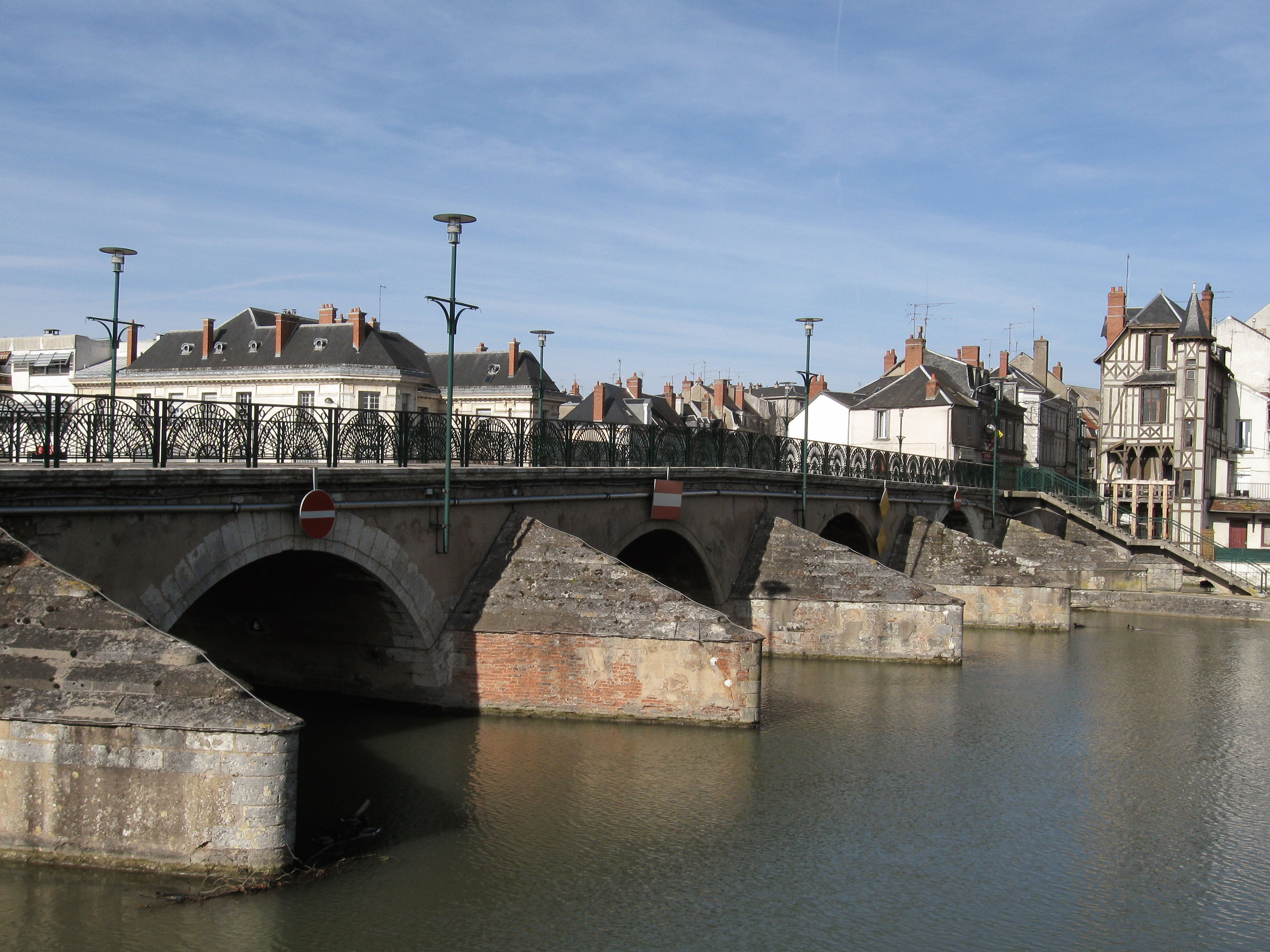 Pont sur le bassin central du canal de Berry et l'Yèvre, Vierzon, Cher, France